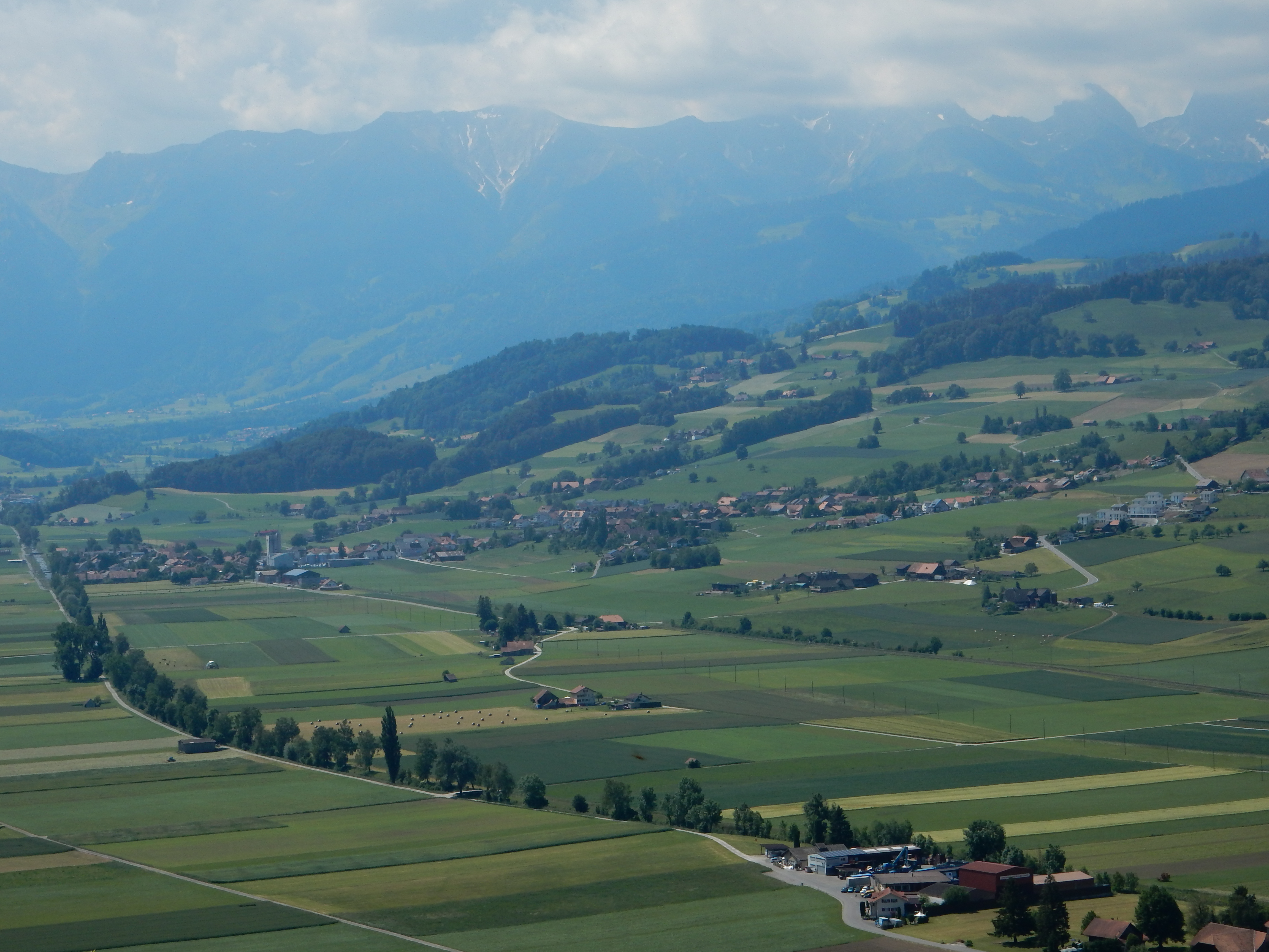 Mühlethurnen (Kanton Bern, Schweiz)